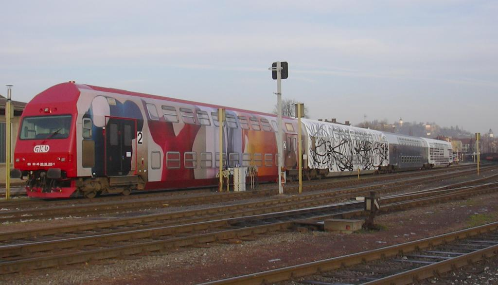 Doppelstockwagen der Graz-Köflacher Bahn. Anlässlich des Kulturhauptstadtjahrs 2003 wurden die Wagen von den Künstlern Erwin Wurm, Otto Zitko, Siegrun Appelt, Gerold Tagwerker und Eva Schlegel gestaltet. Graz Köflacher Bahnhof, 20. Dezember 2002. photo: tobias b köhler